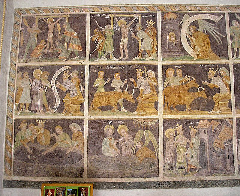 Kapelle St. Georg bei Peißenberg (Landkreis Weilheim-Schongau, Oberbayern). Gotisches Wandbild "Leben des hl. Georg" (um 1400/10), Südteil. Eigene Aufnahme, August 2007 / St. George's chapel near Peissenberg (Upper Bavaria, Germany). Gothic wallpainting " Life of St. George" (ca. 1400/10), southern part. Own photo, Aug. 2007